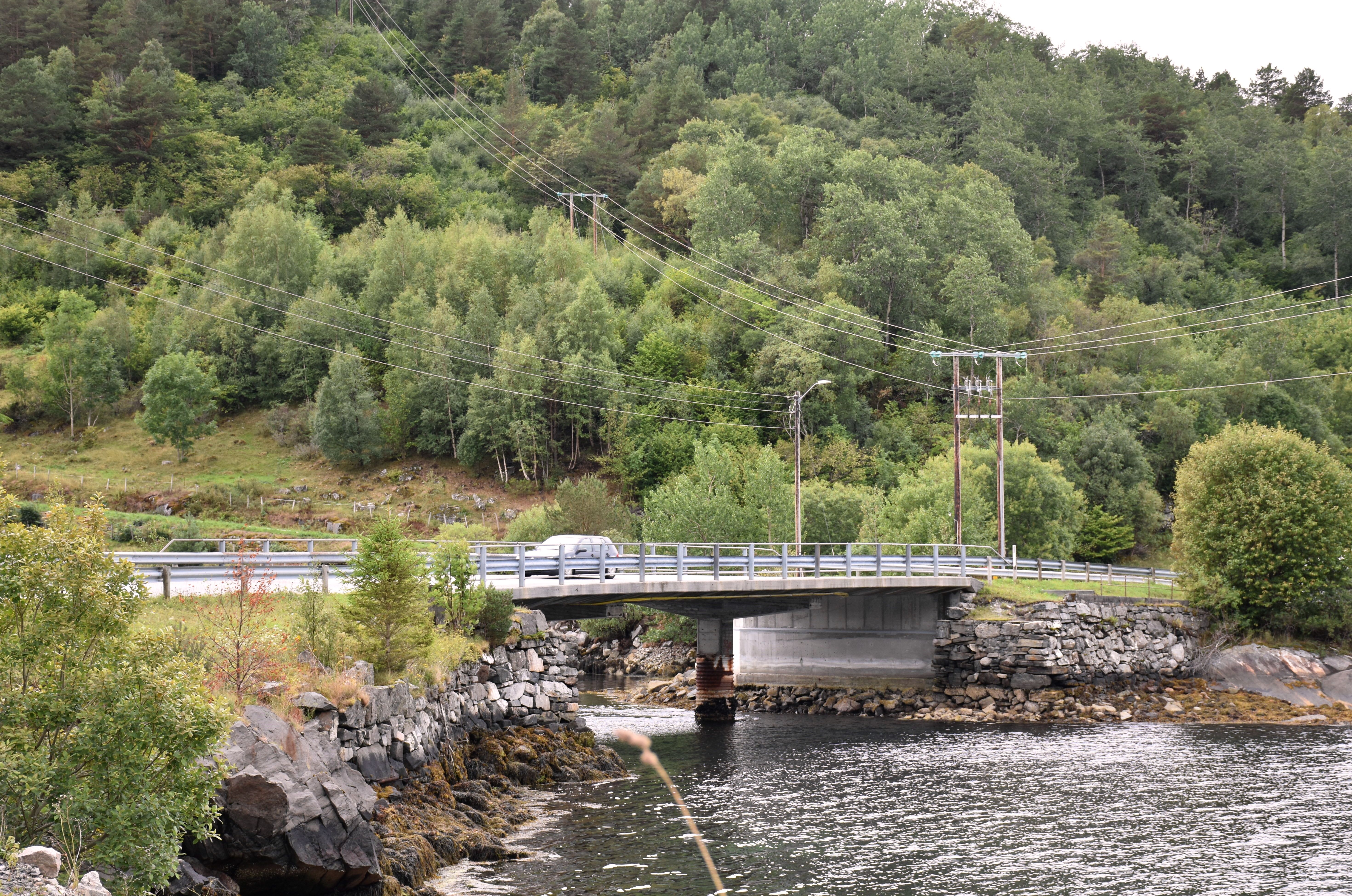 Straumsbrua med Norvikvegen (fylkesvei 181)